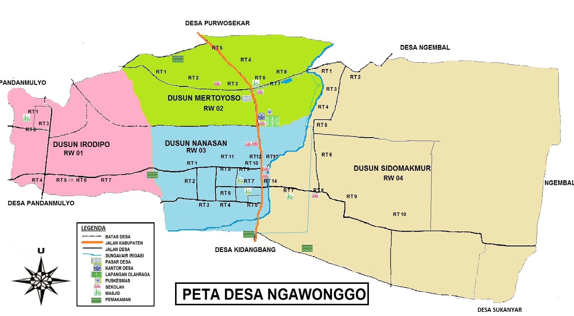 Peta_Ngawonggo